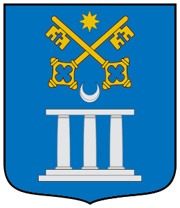 Escudo de Vergara/Bergara, en Guipúzcoa (España)